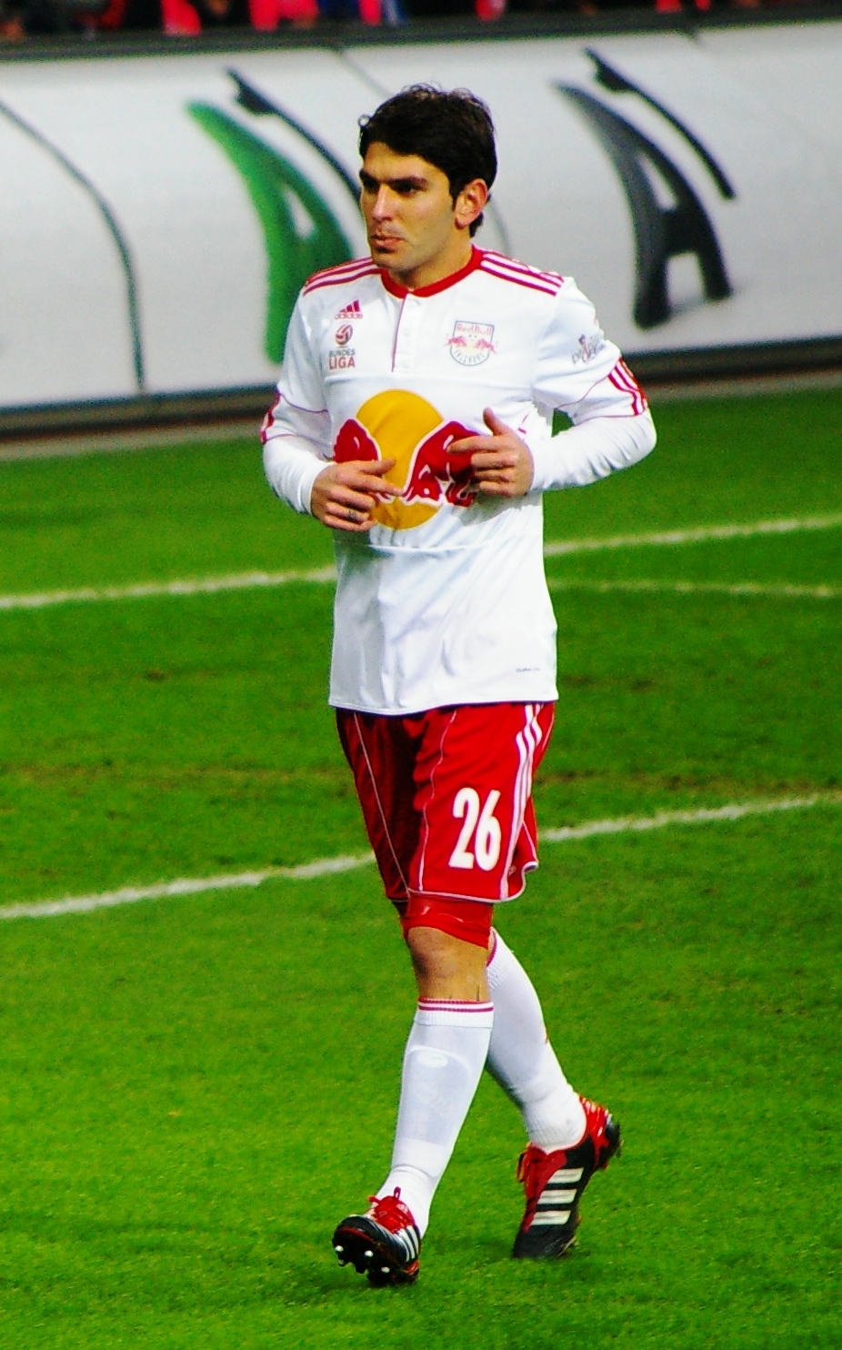 Stürmer Red Bull Salzburger